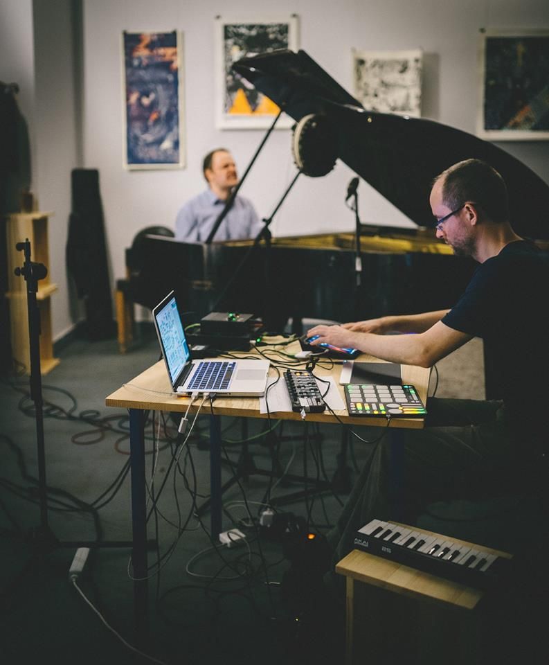 Photo by Jázon Kováts